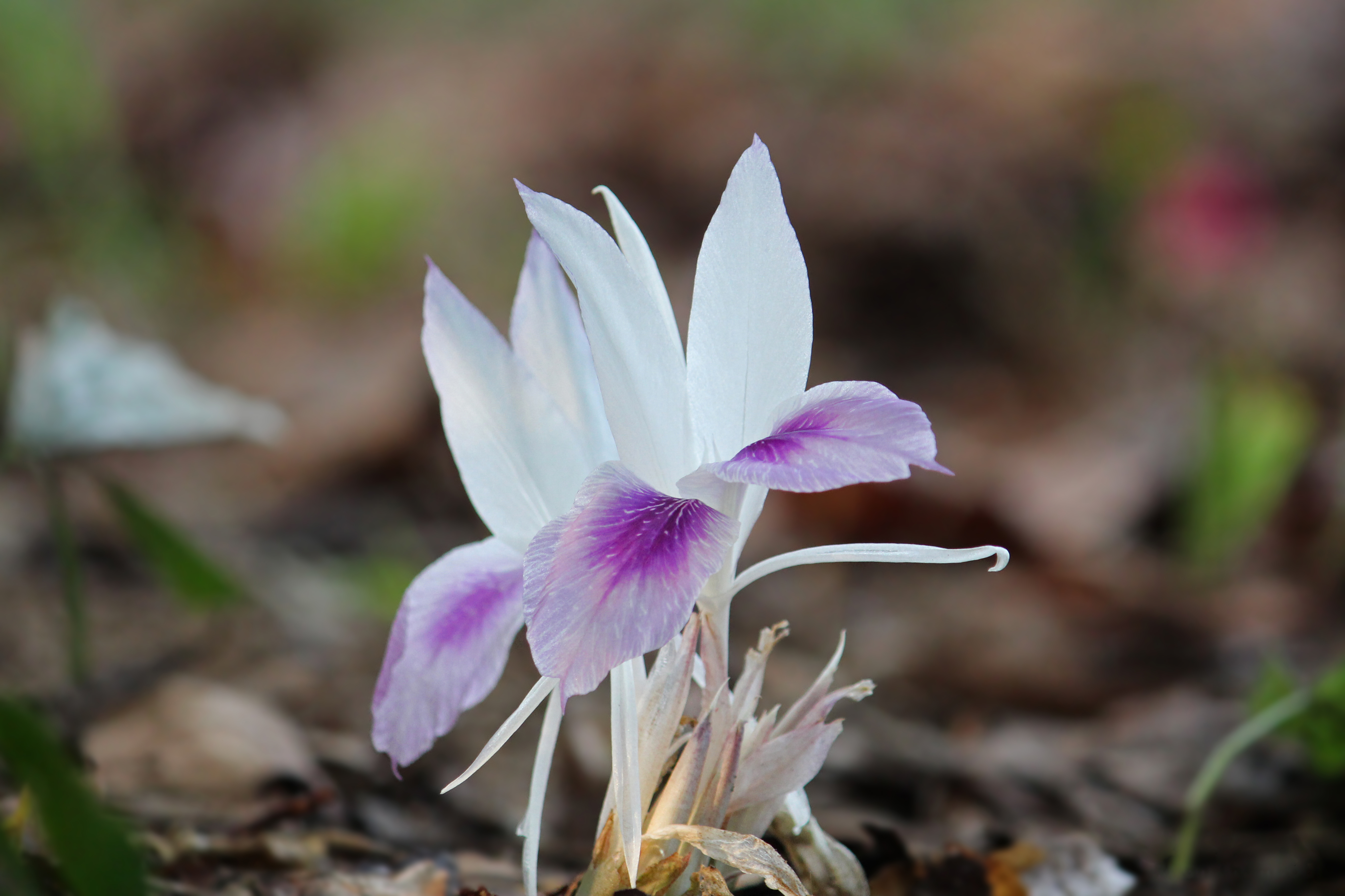 Botanical name: Kaempferia rotunda.